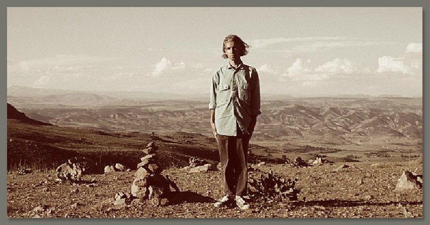 Mahmut Celayir: Selbstporträt, Fotozyklus, 1999.